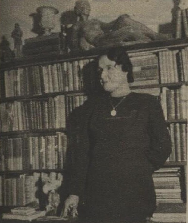 Helena Dvořáková (1895-1970), česká redaktorka a spisovatelka